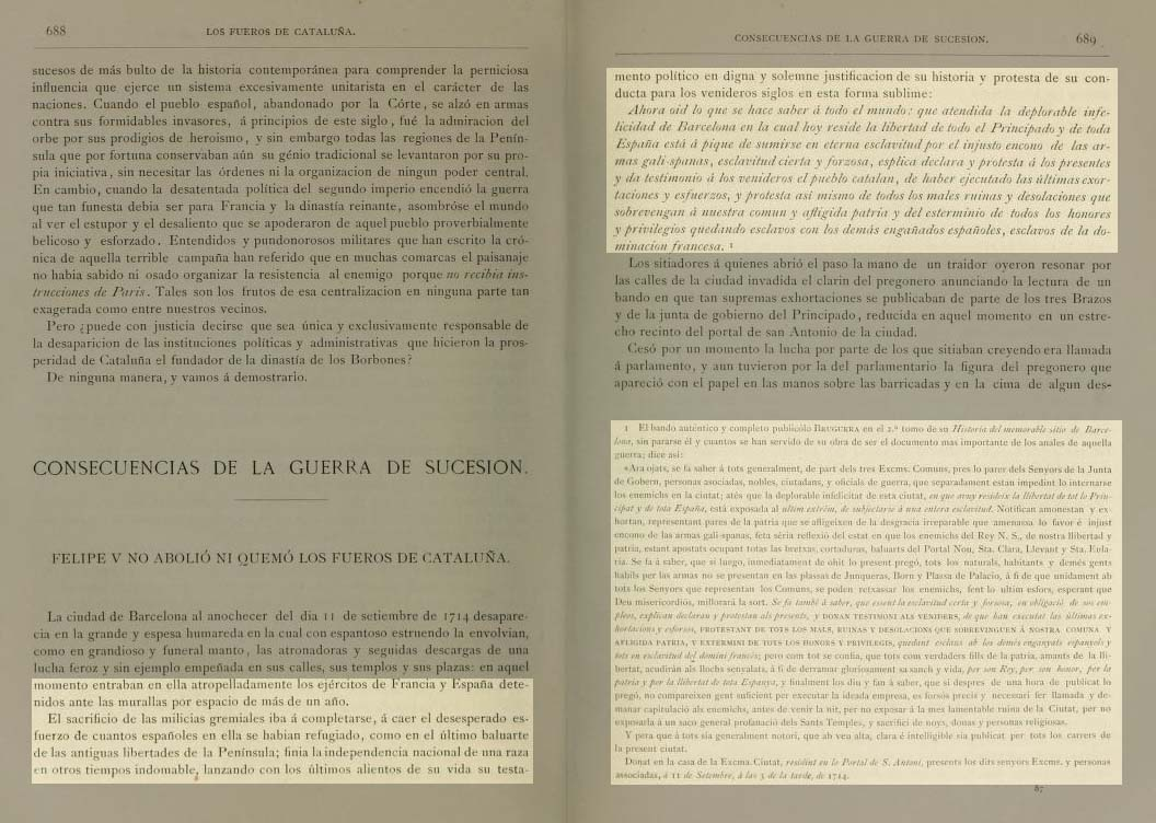 Los Fueros de Cataluña (1878: 688-689).